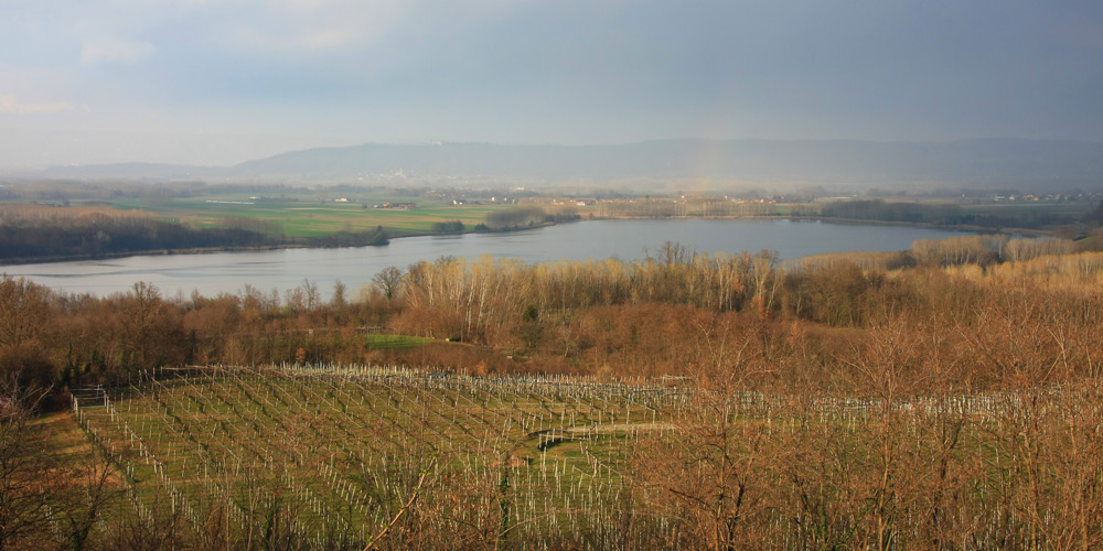 Panorama del lago di Candia da sopra Caluso (TO)